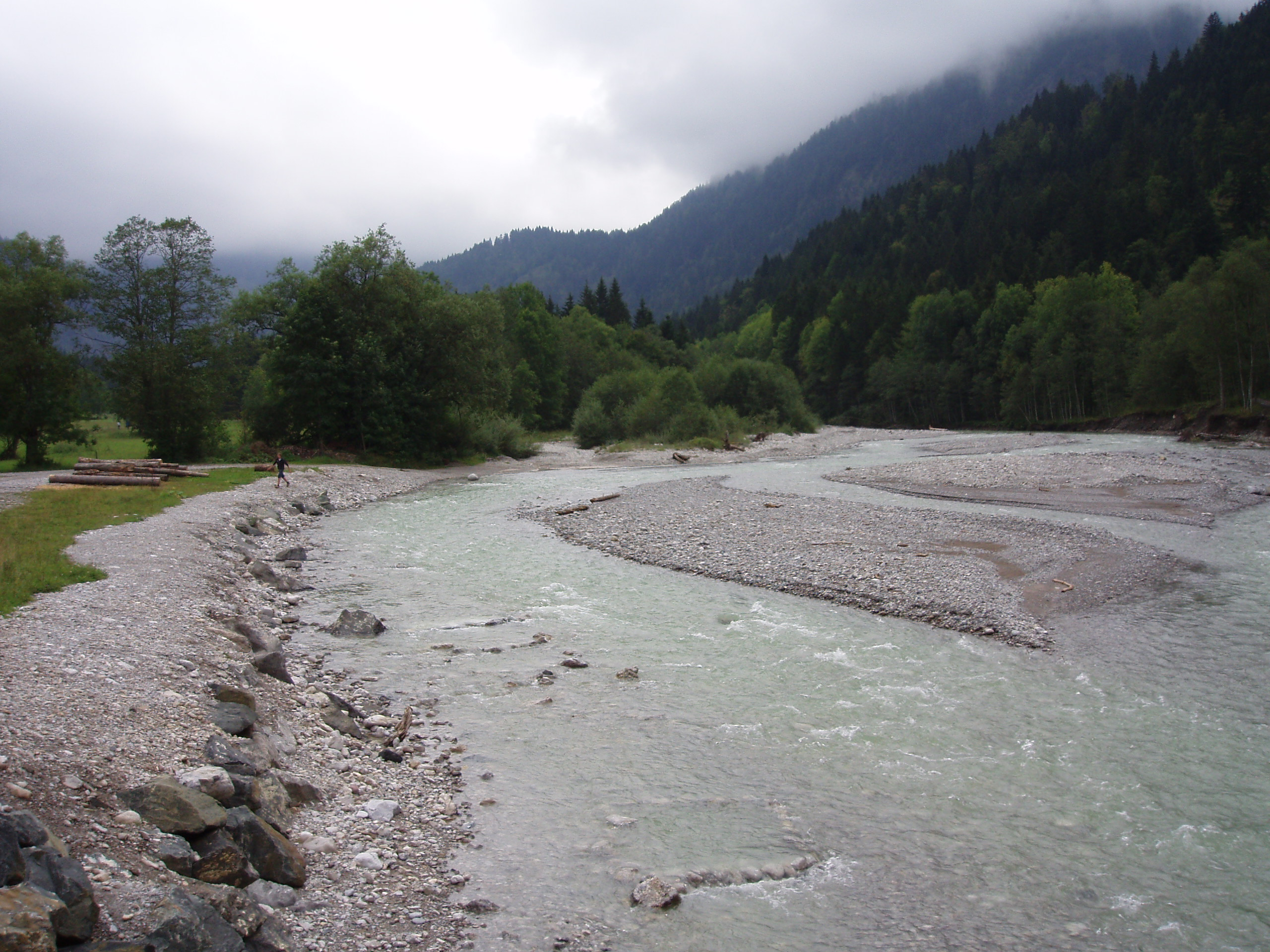 Die Ostrach bei Hinterstein.